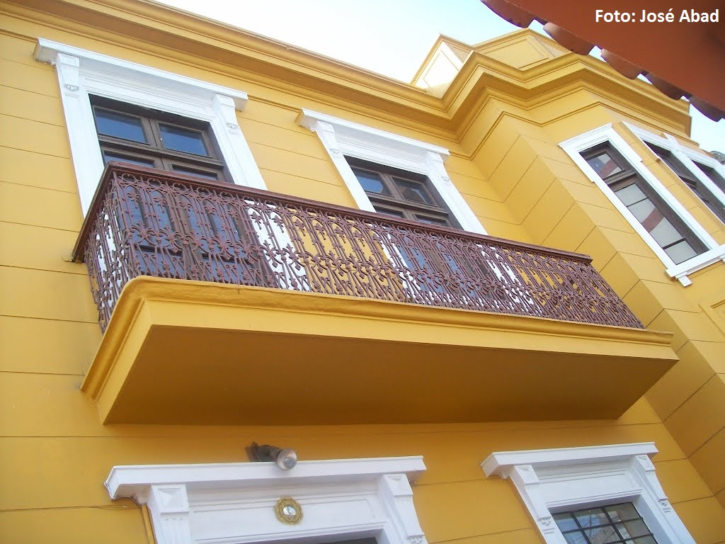 Balcón característico de las construcciones de las primeras décadas del siglo XX en la primera cuadra de la Avenida República de Portugal, en el distrito de Breña.